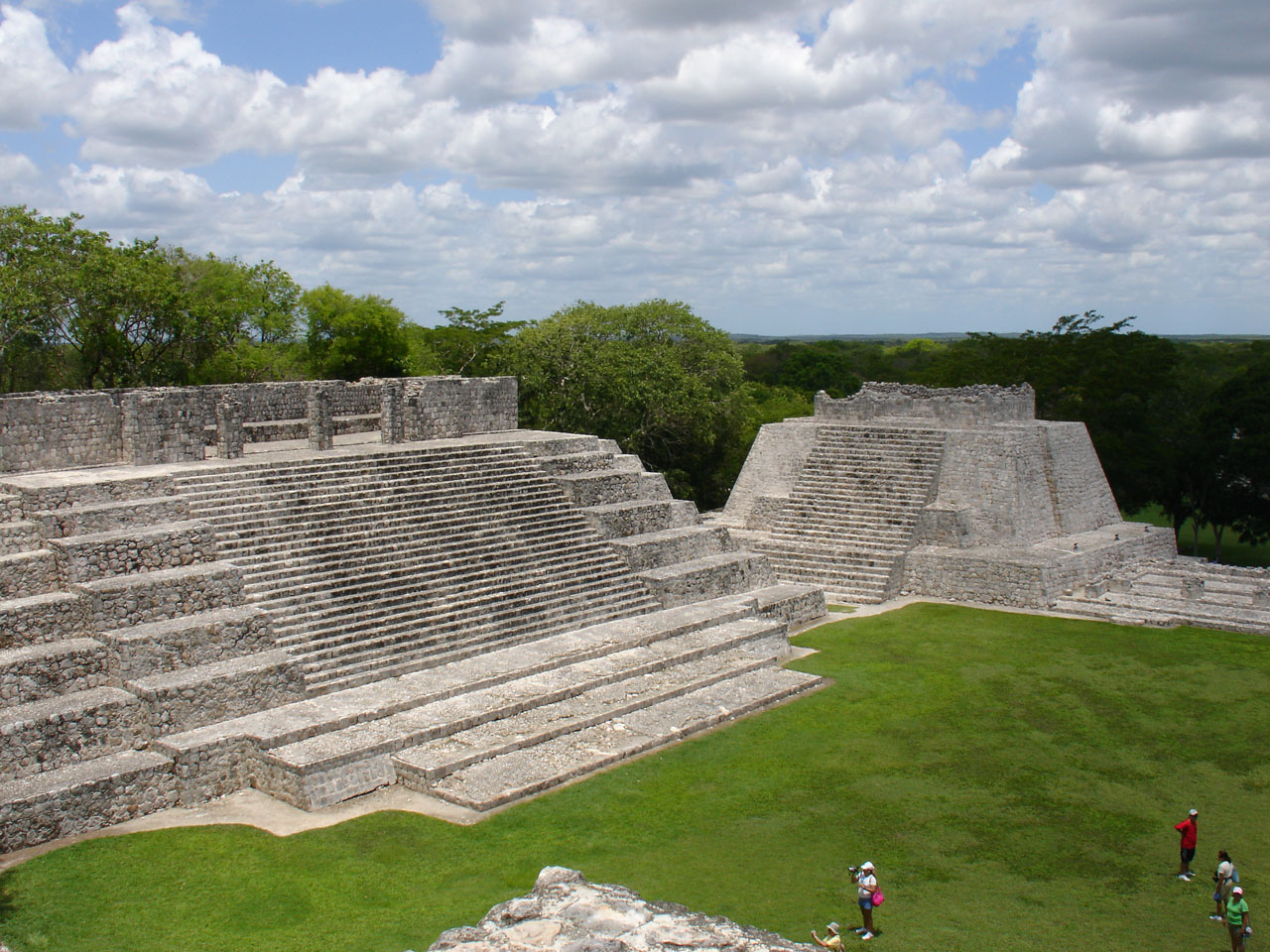 Zona arqueológica de Calakmul.